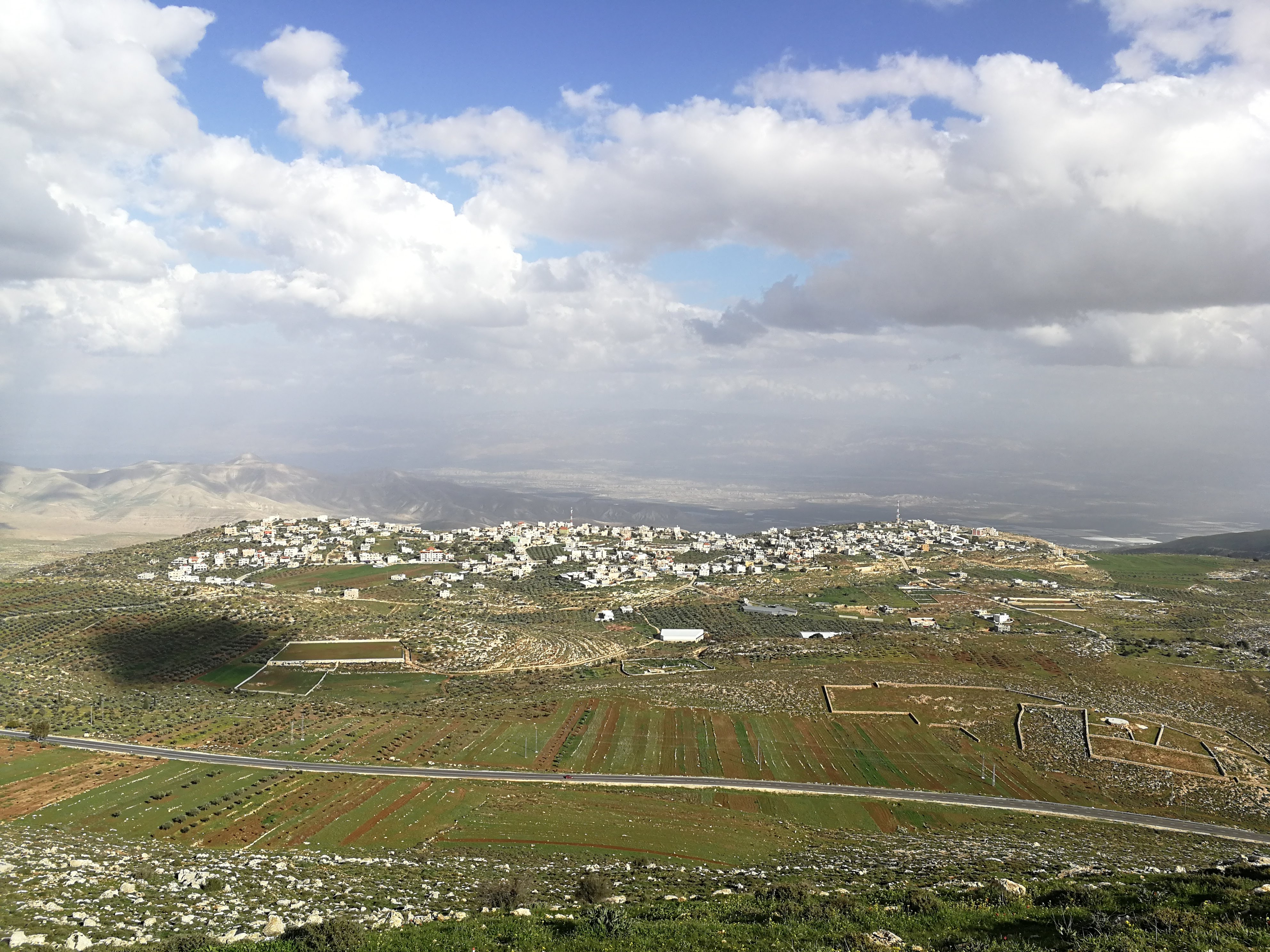 כפר דומא ומדינת ירדן ברקע